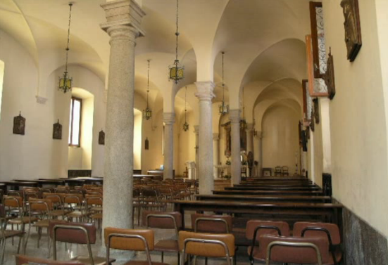 La cappella di Santa Maria Ausiliatrice a Palazzo Brentano - Corbetta (MI) - Italy